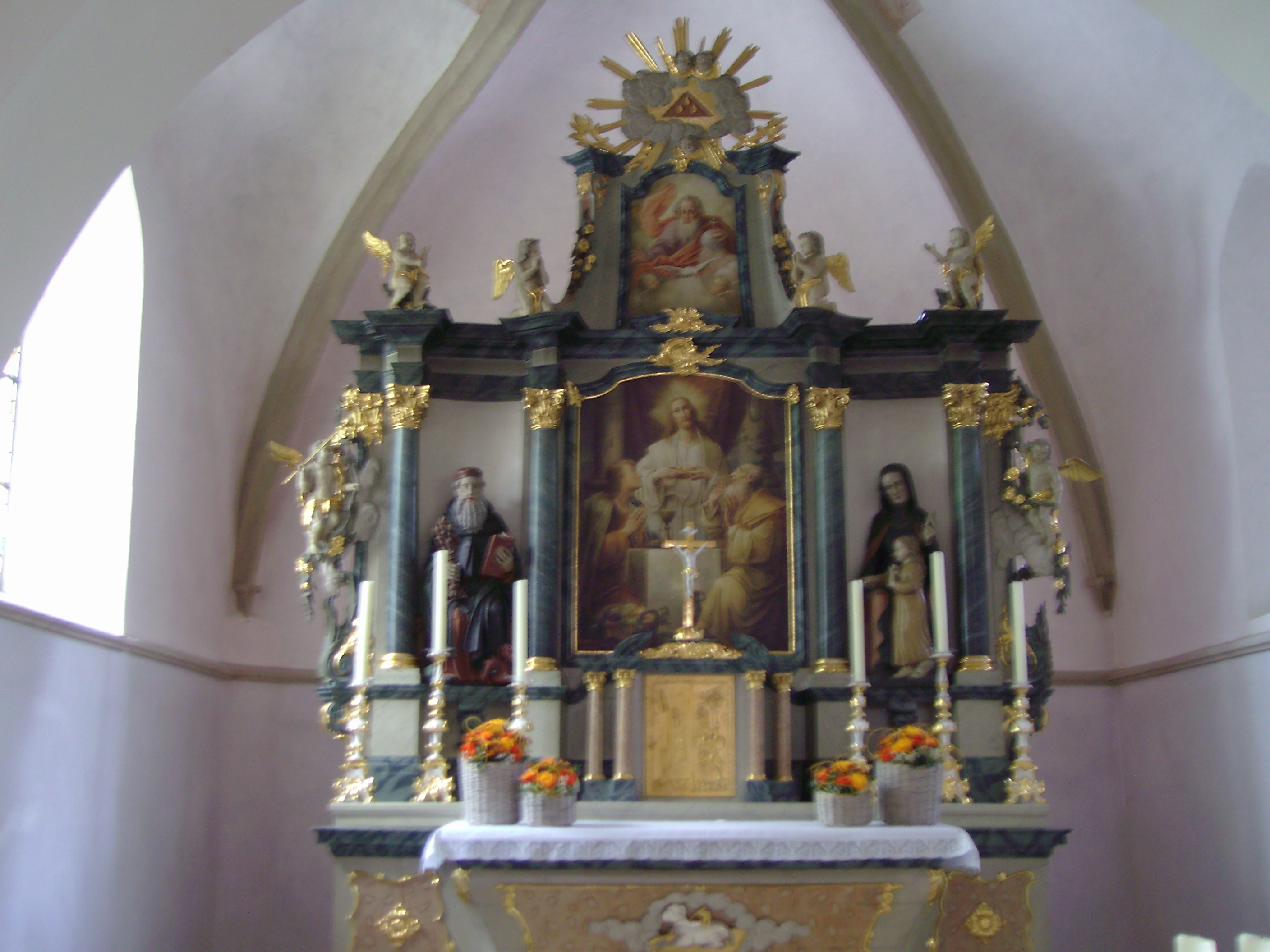 Remsede